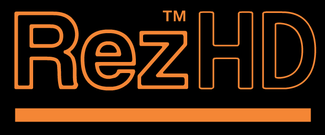 Логотип видеоигры «Rez HD».